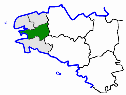 Arrondissement of Châteaulin, Département Finistère, France